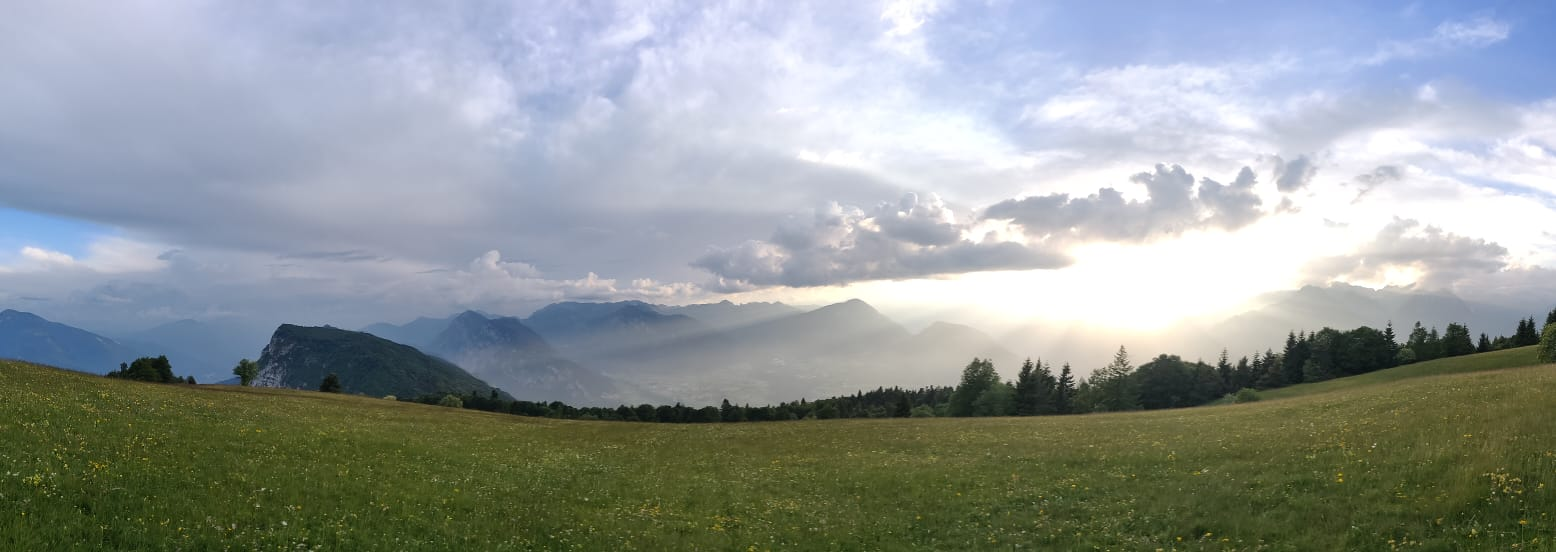 Prati del Monte Casale con panorama sulle Giudicarie Esteriori